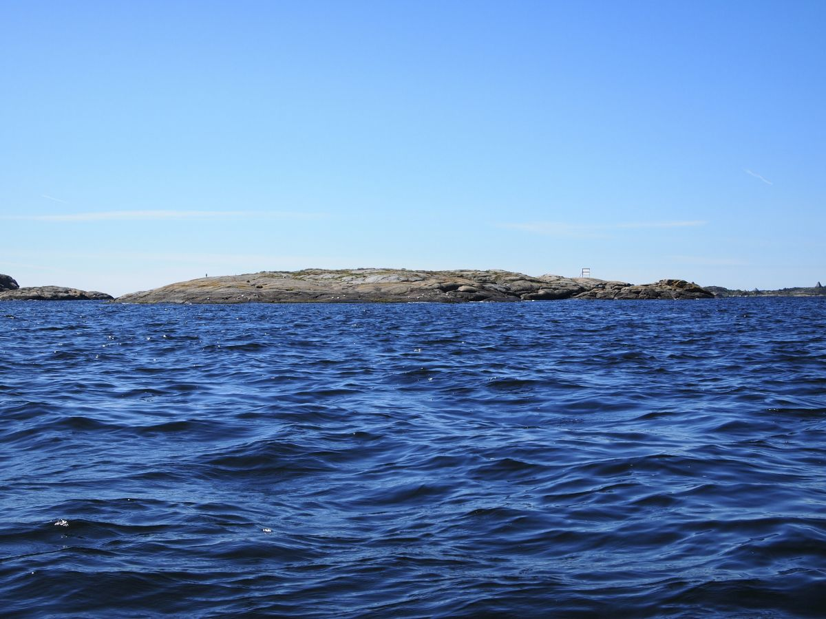 Sundskjæra er to holmer ytterst i Viksfjord.